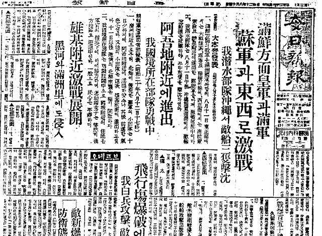 Maeil Shimpo (August 14, 1945)